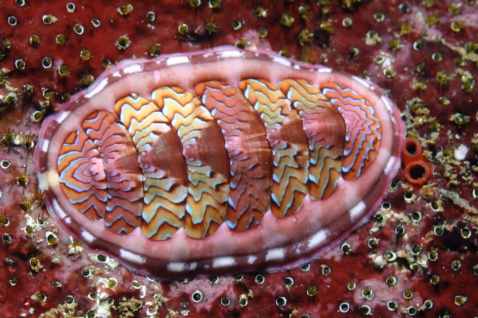 Tonicella lokii sobre una colonia de gusanos Dodecaceria concharum, en Point Lobos. EE.UU.